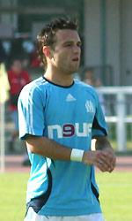 Photographie de Mathieu Valbuena à l'entraînement à la Commanderie après le match contre Lille, le 8 avril 2007.